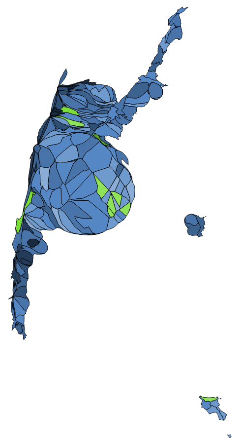 顏色對照表